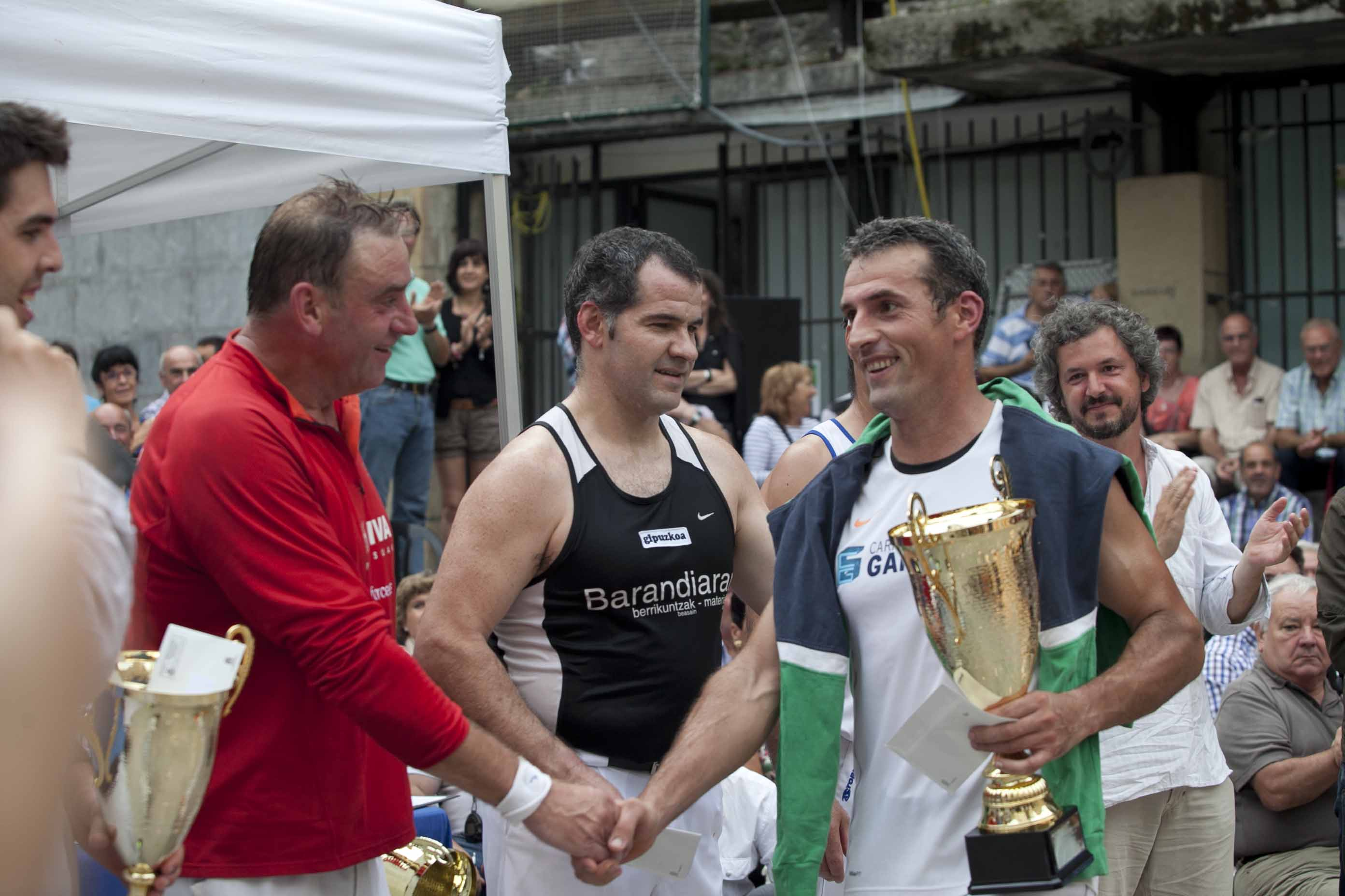 2012ko Aizkolarien Urrezko Koparen sari banaketa. Joxe Mari Olasagasti Floren Nazabal irabazleari zorionak ematen ageri da.